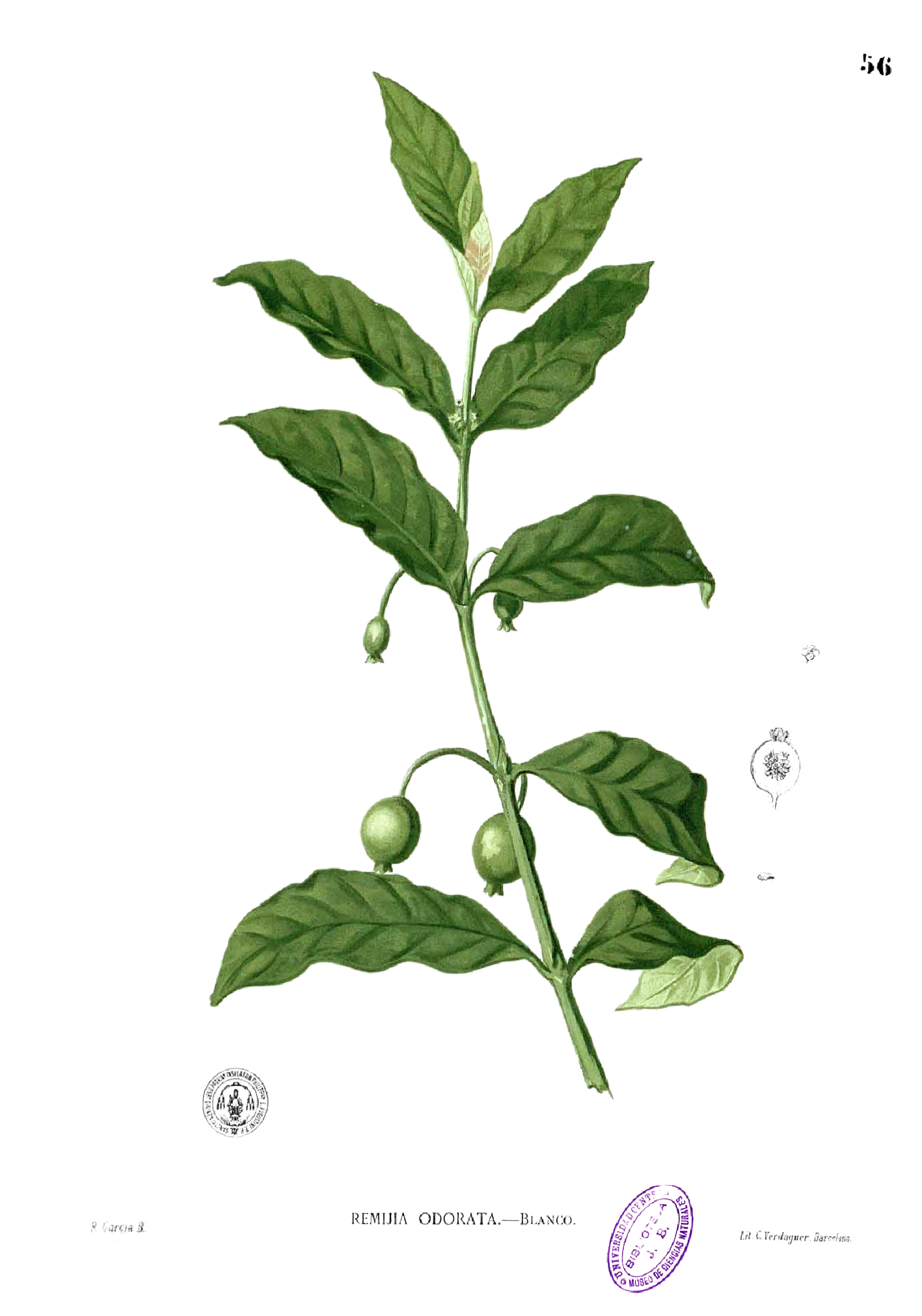 Aidia densiflora (syn. Randia densiflora) Plate from book